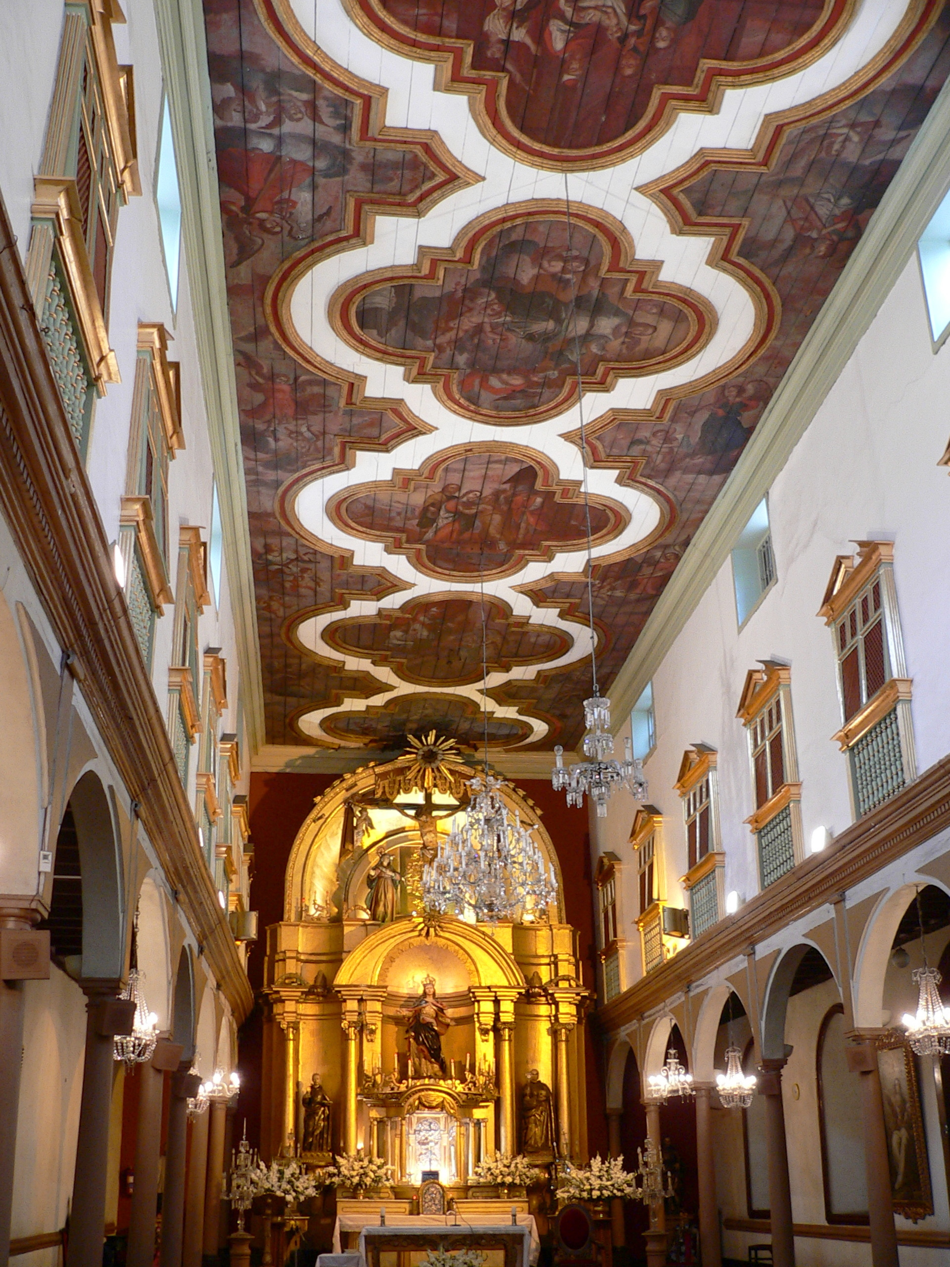 Capilla Virgen de la O. Foto tomada por Manuel González Olaechea y Franco